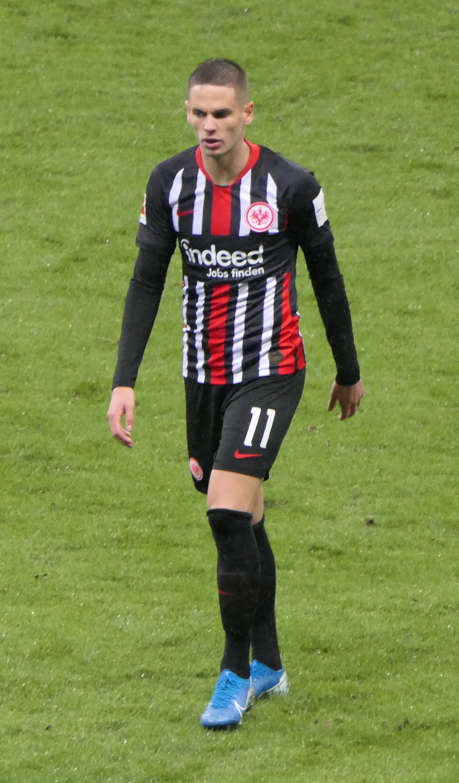 Der Fussballprofi Mijat Gaćinović im Trikot von Eintracht Frankfurt beim Heimspiel gegen den SV Werder Bremen am 06.10.2019.